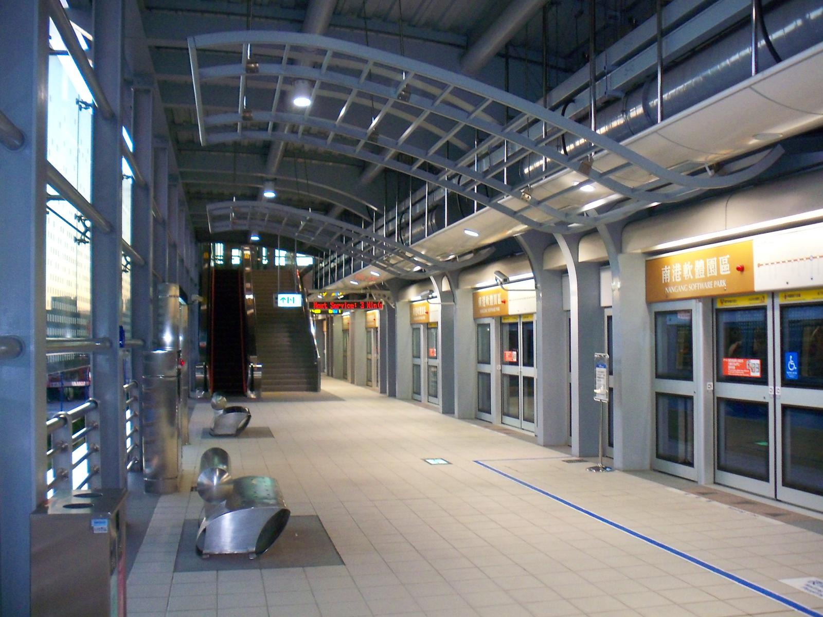 台北捷運南港線南港軟体園区駅2番線ホーム。中文（台灣）: 台北捷運南港線南港軟體園區站第二月台。